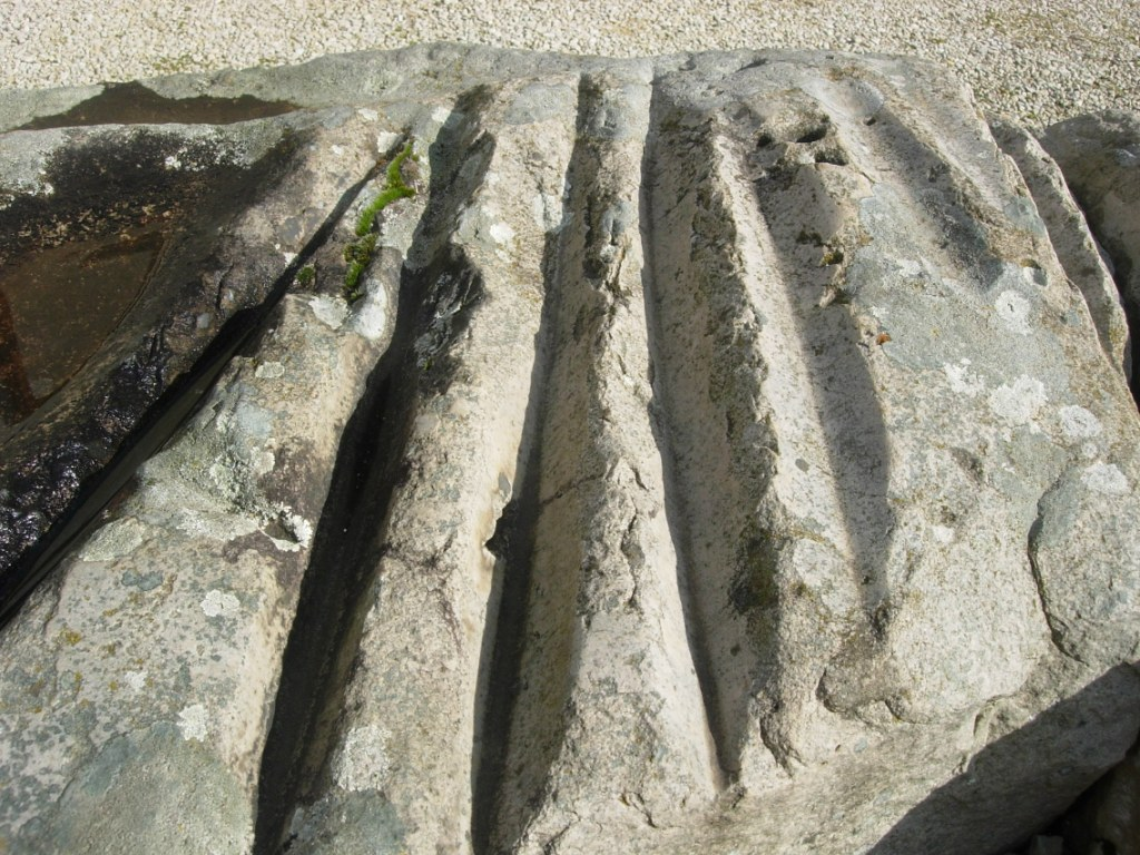 Polissoir. Néolithique. Aube. France. Marcilly-le-Hayer. Musée de Troyes.